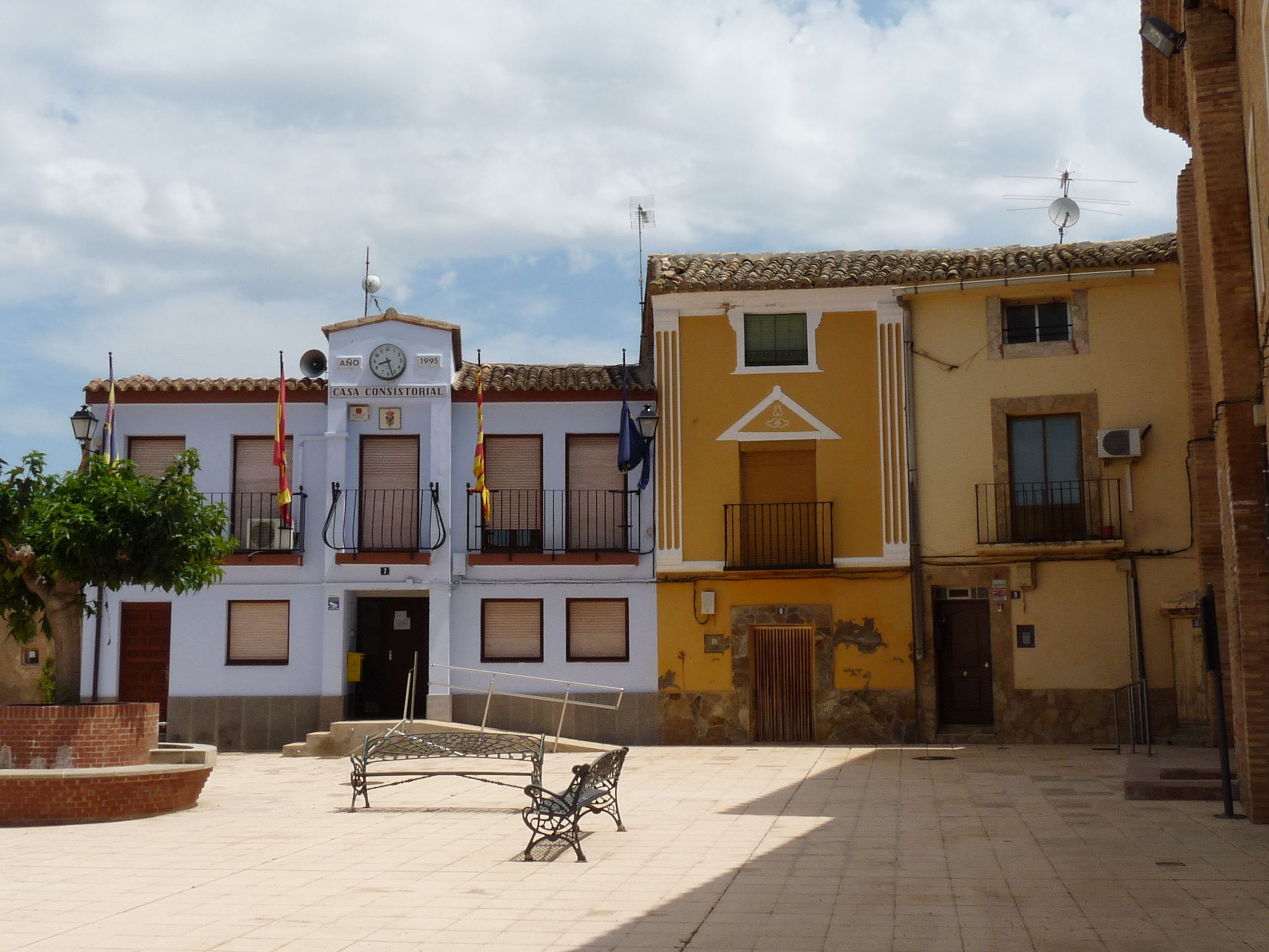 Bárboles - Ayuntamiento